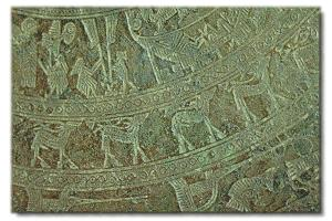 Dong Son drums